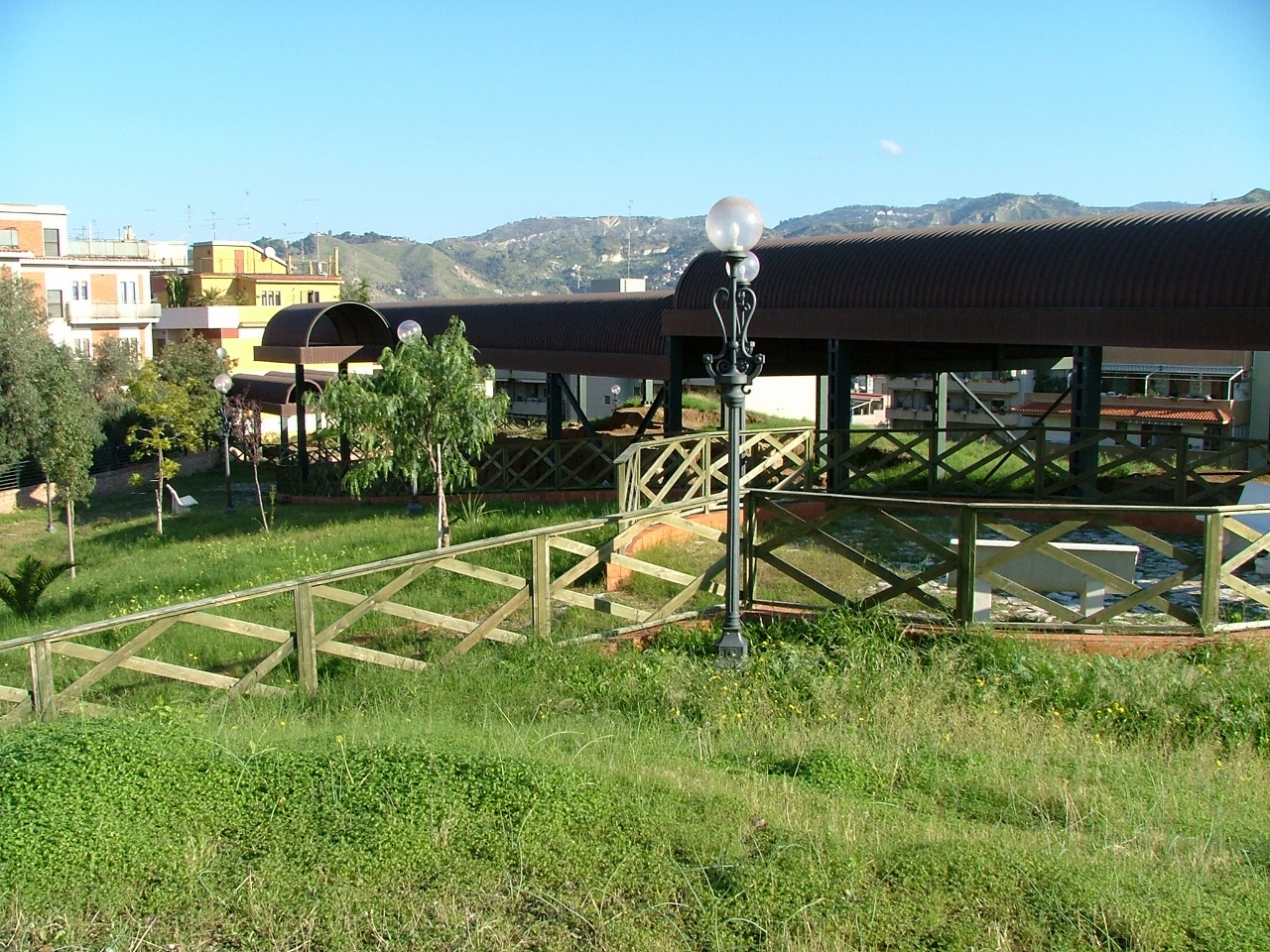 Parco archeologico This is a photo of a monument which is part of cultural heritage of Italy.